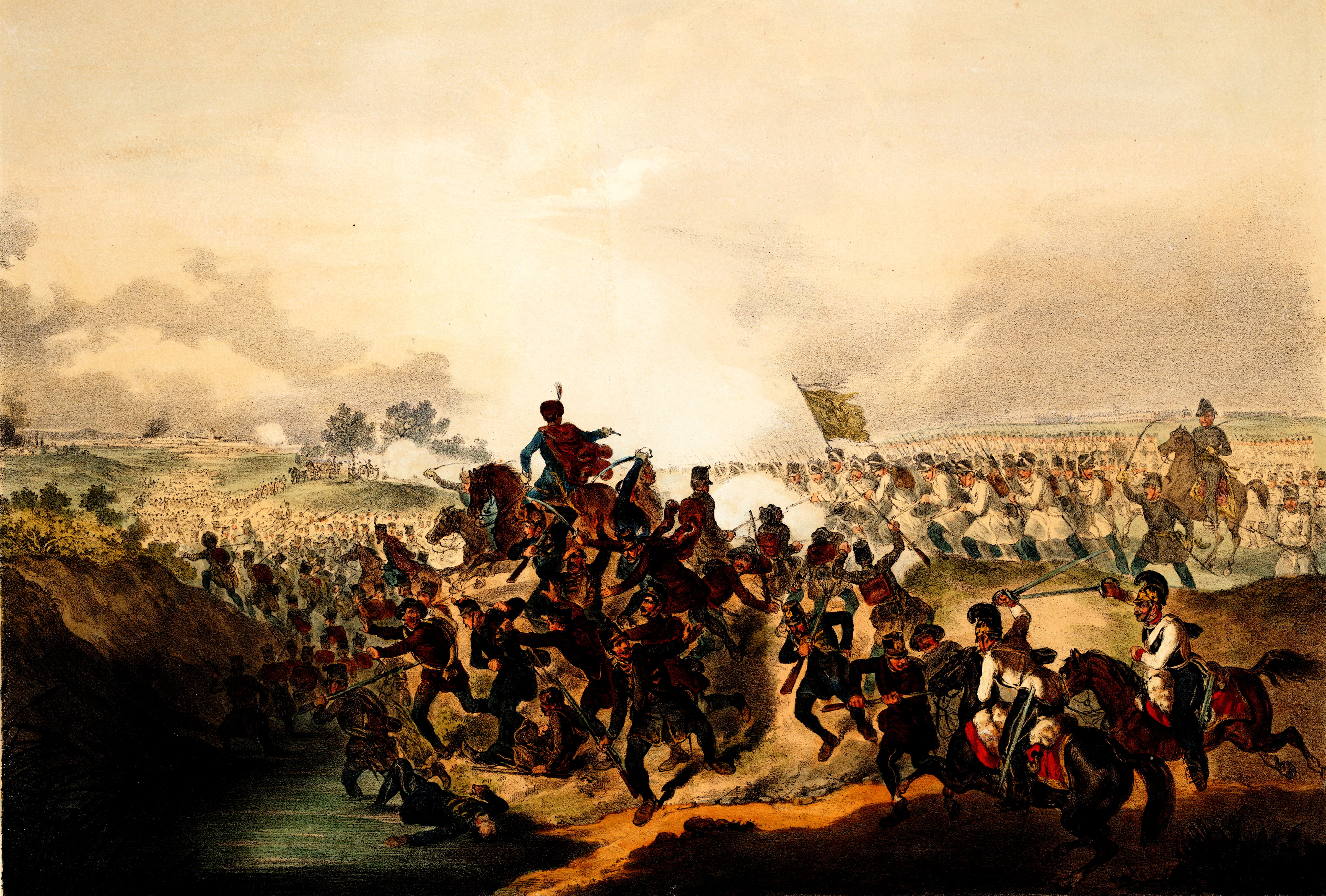 A temesvári csatában a Bem József vezette magyar sereg katasztrofális vereséget szenvedett a Haynau tábornagy által irányított cs. kir. csapatoktól 1849. augusztus 9-én. A csata az 1848–49-es forradalom és szabadságharc utolsó csatája lett; a visszavonulás során a magyar seregek harcrendje felbomlott, és a csapatok kb. fele érkezett csak meg Lugosra, Haynau felmentette az ostromlott Temesvárt.